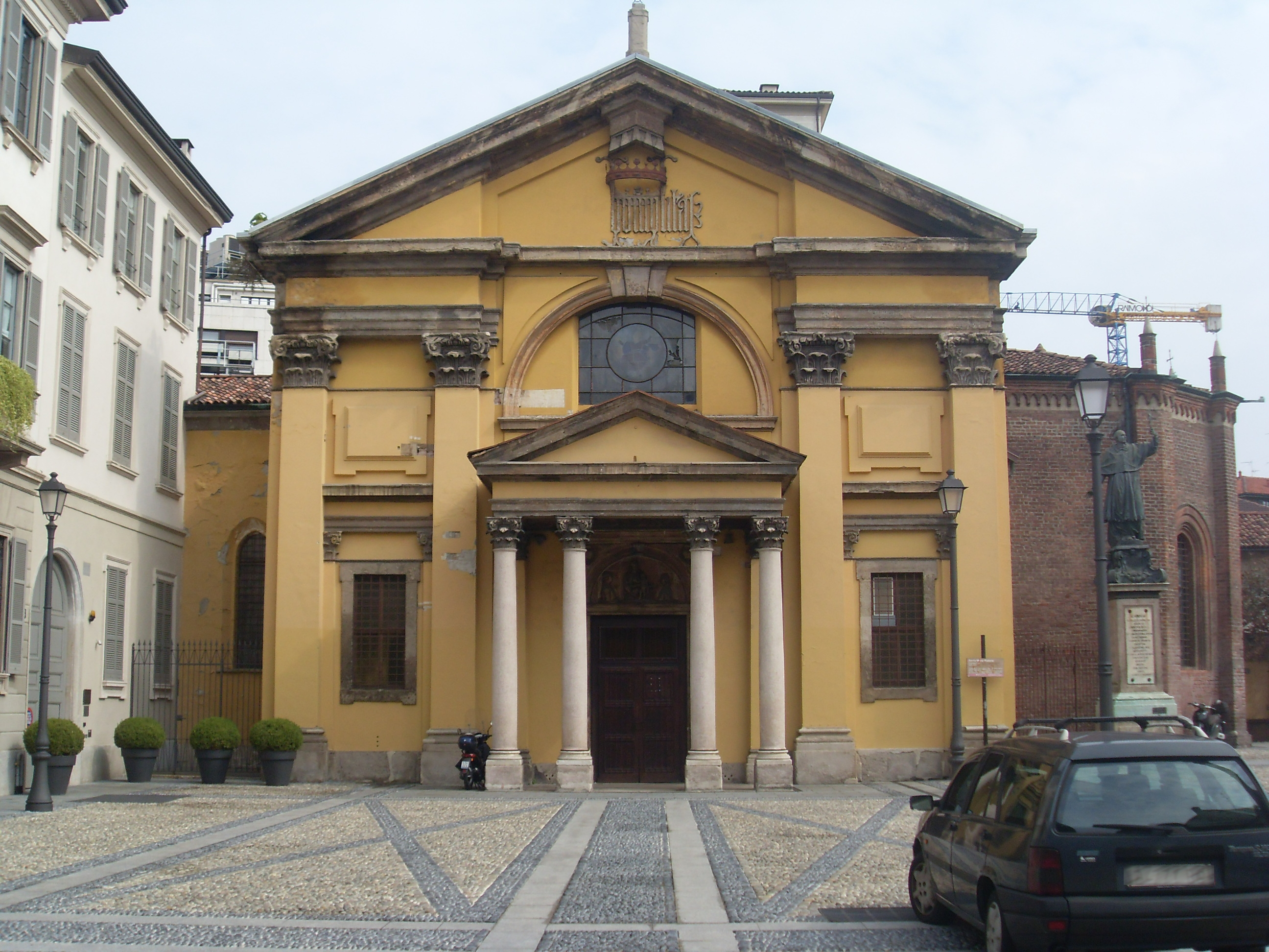 Foto della chiesa di santa Maria Podone a Milano.